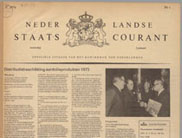 An issue of Nederlandse Staatscourant from 1974